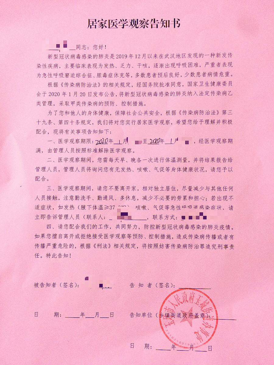 中文（中国大陆）: 浙江省玉环市人民政府玉城街道办事处出具的一封居家医学观察告知书